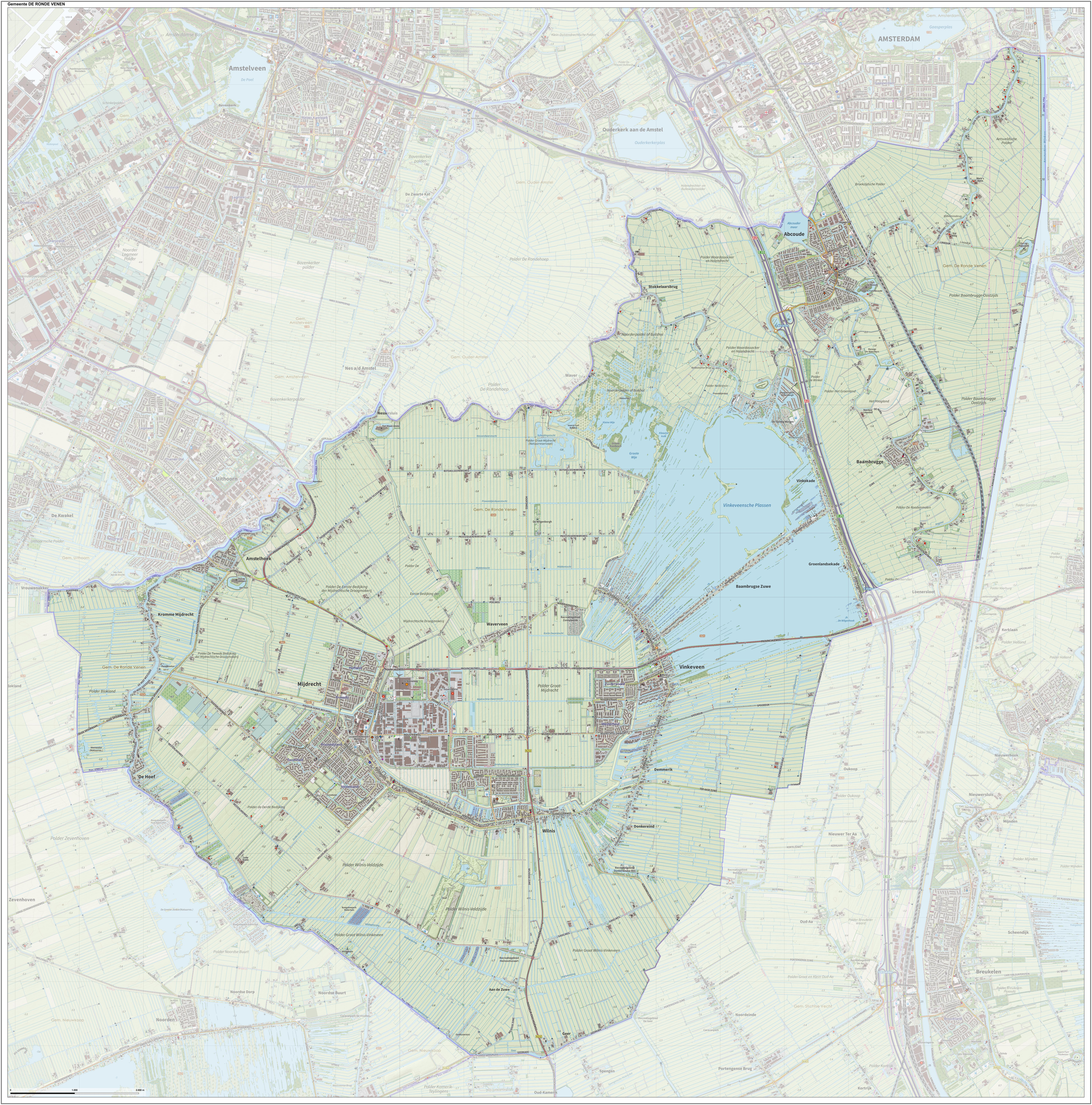 Topografische gemeentekaart. Resolutie: 400 pixels/km. Kaartbeeld samengesteld uit de open geodata van de Top10NL en Top25namen (Kadaster), Creative Commons-BY licentie. Gebouwvlakken uit open geodata BAG extract. Wegen uit de OpenStreetMap, OpenStreetMap community. Reliëfschaduw uit de Actuele Hoogtekaart AHN2. Samenstelling en kleurenschema: Jan-Willem van Aalst, met QGIS. Zie ook de Legenda.